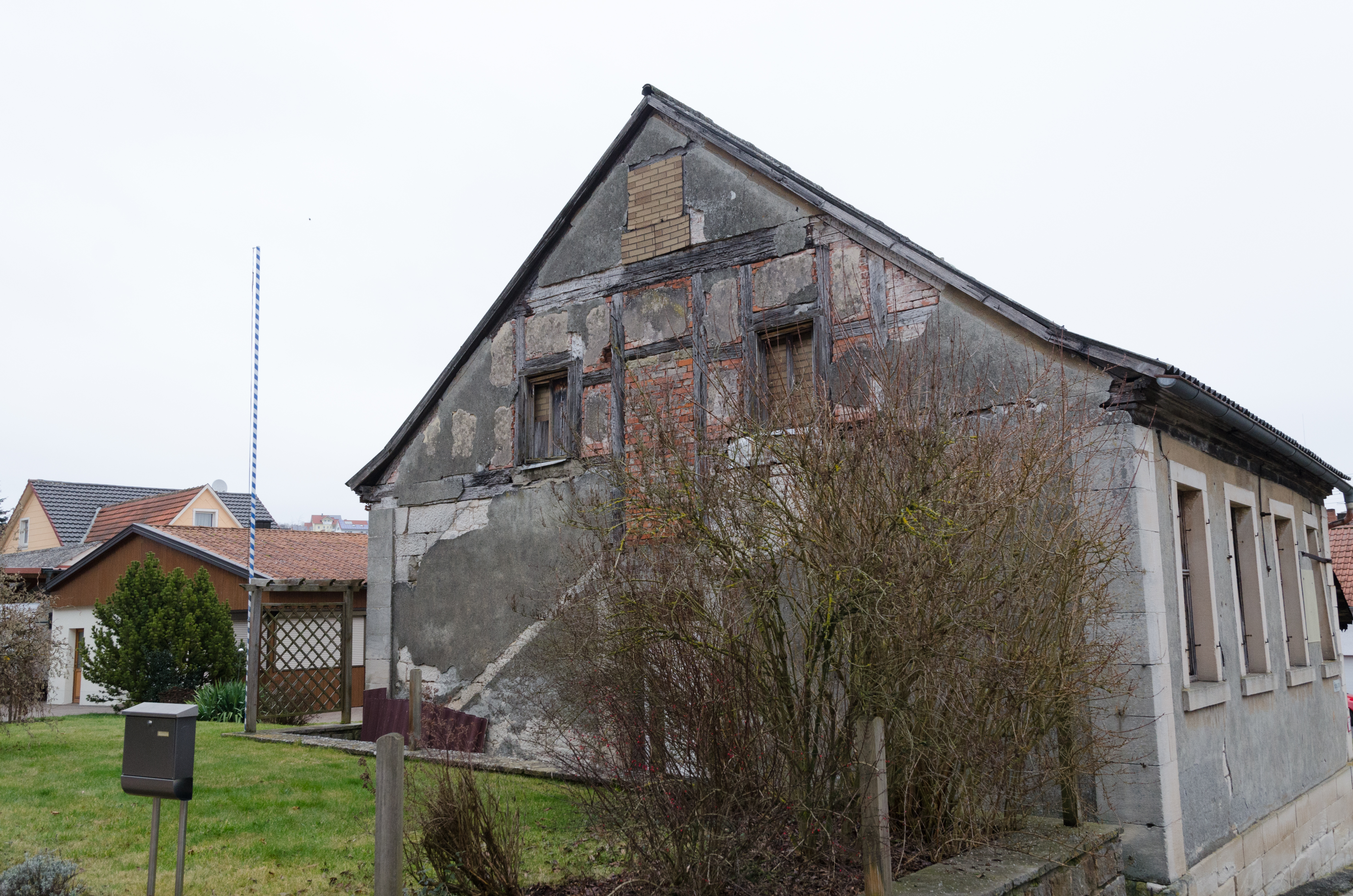 Großeibstadt, Kleineibstadt, Wegkreuz, An der Barget, Ehem. Synagoge